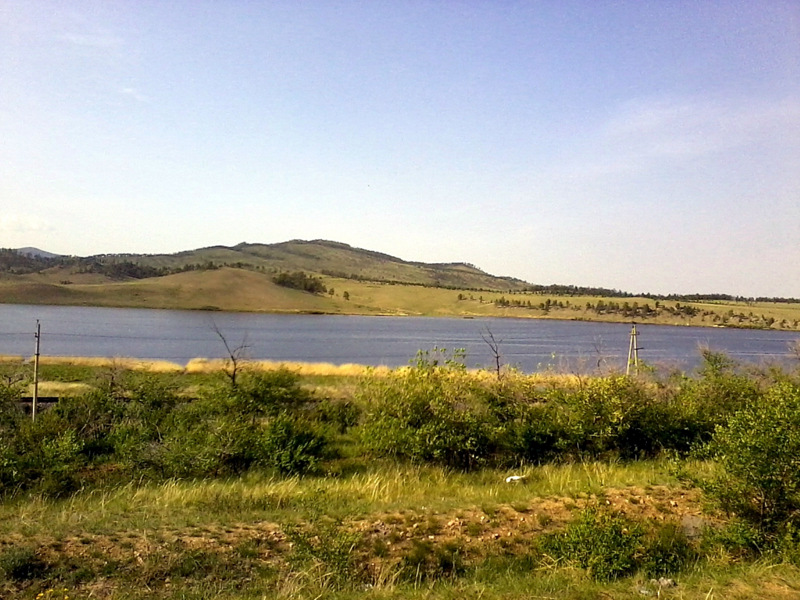 Абрамовское озеро и гора Большой Алтан. Вид с Кяхтинского тракта